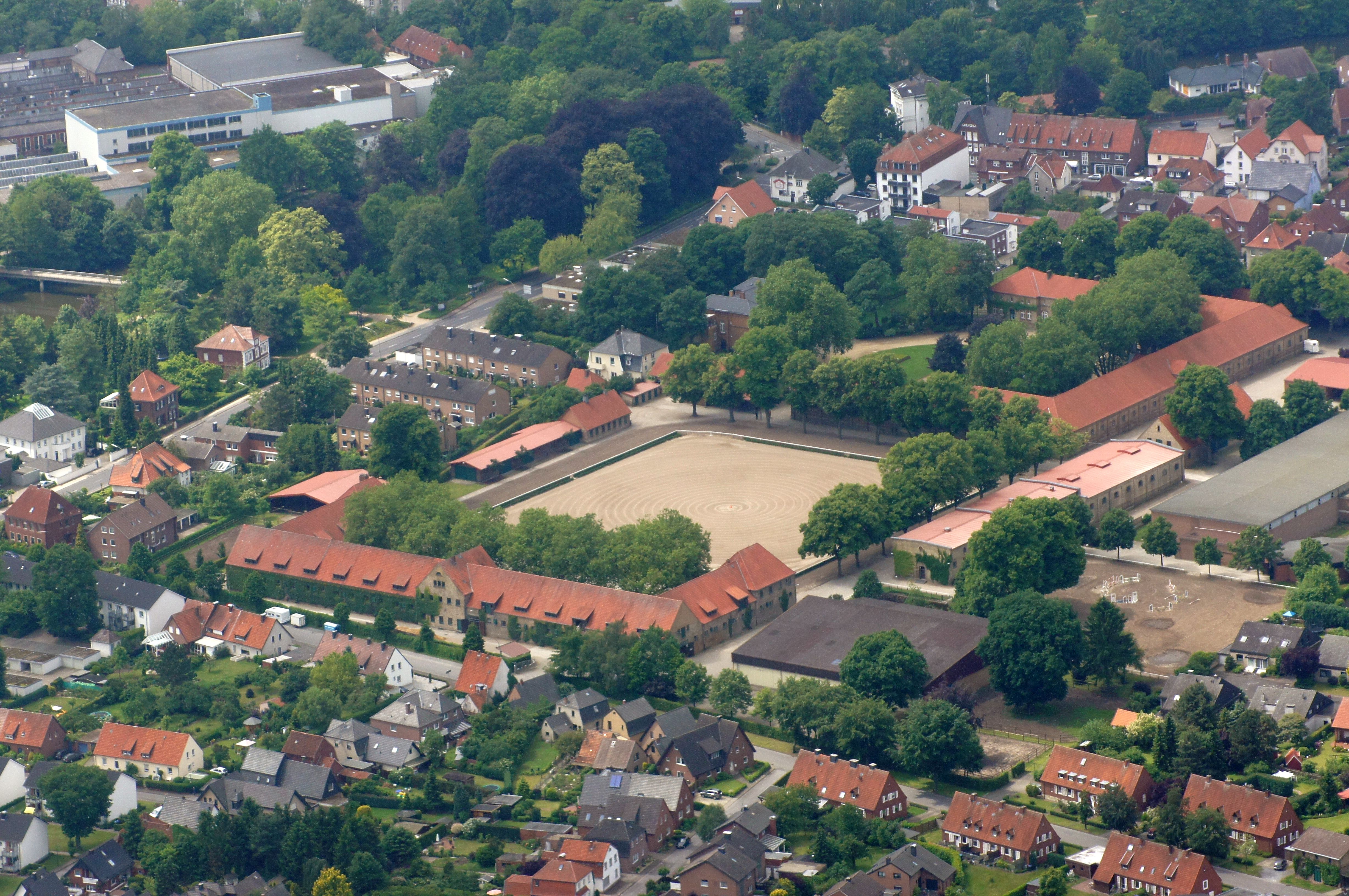 Das Nordrhein-Westfälische Landgestüt in Warendorf, Nordrhein-Westfalen, Deutschland. Die Aufnahme entstand während des Münsterland-Fotoflugs am 1. Juni 2014. Hinweis: Die Aufnahme wurde aus dem Flugzeug durch eine Glasscheibe hindurch fotografiert.